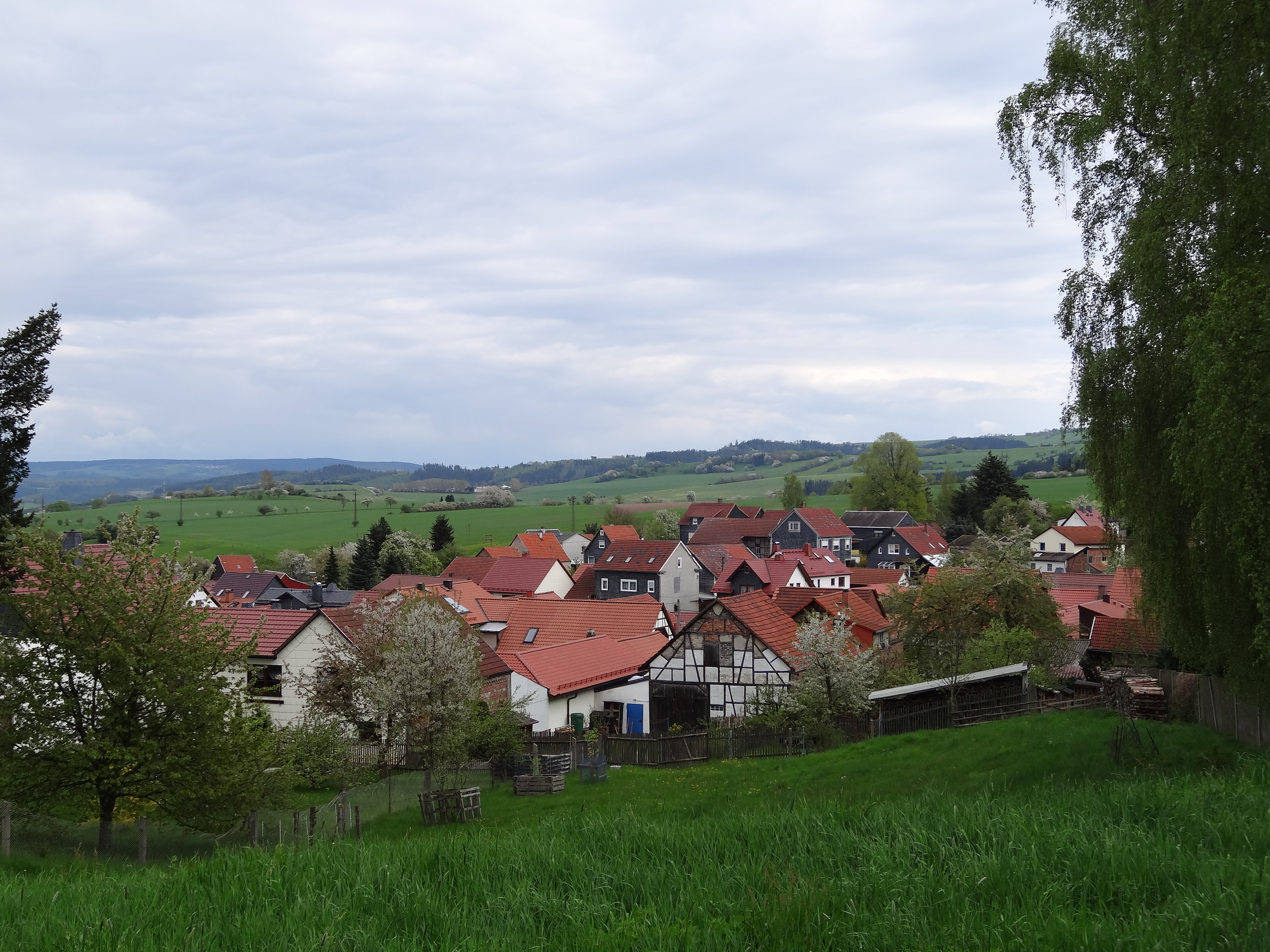 Blick auf Pennewitz, Thüringen (Teilansicht)